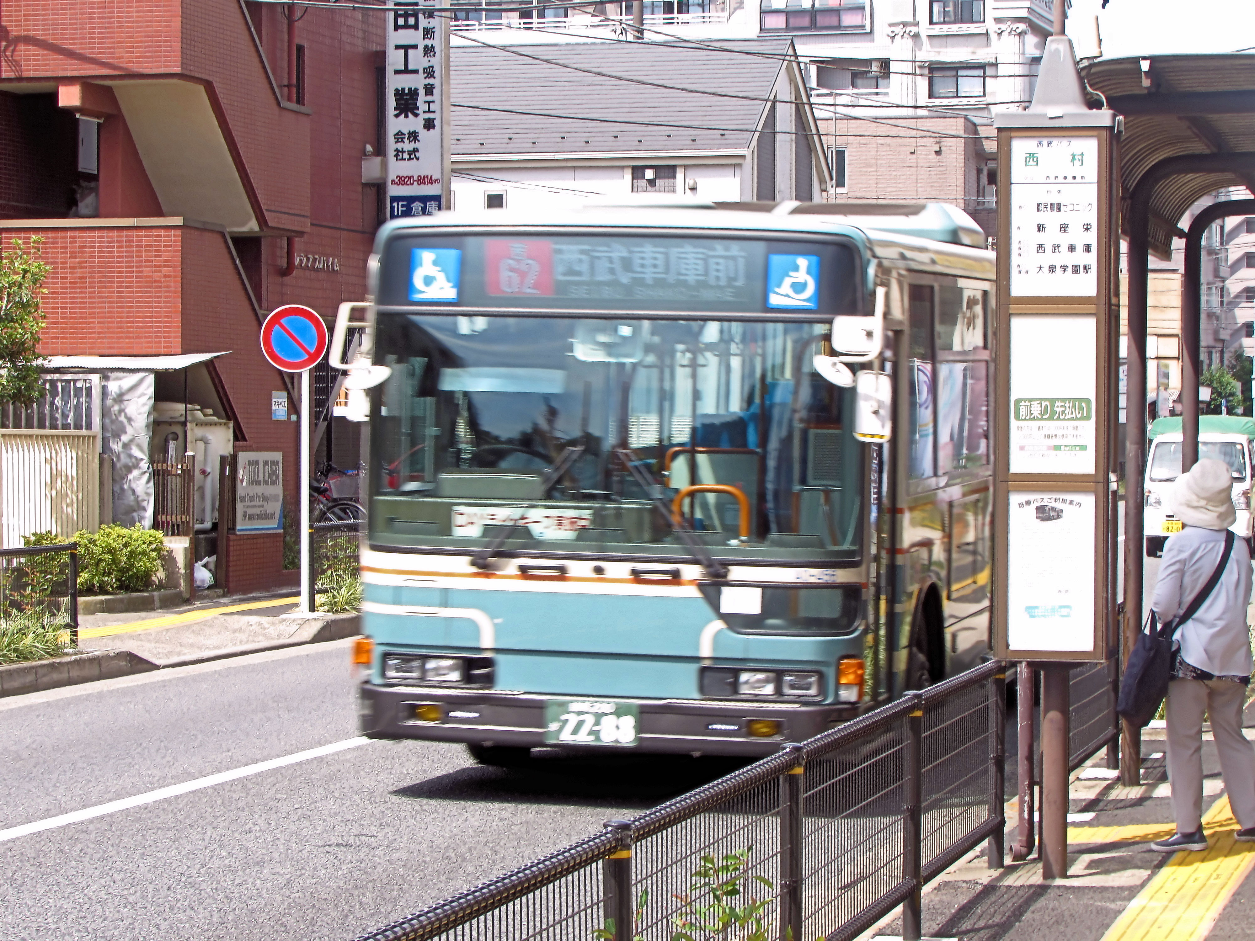 2018年7月3日「西村」停留所付近で撮影。